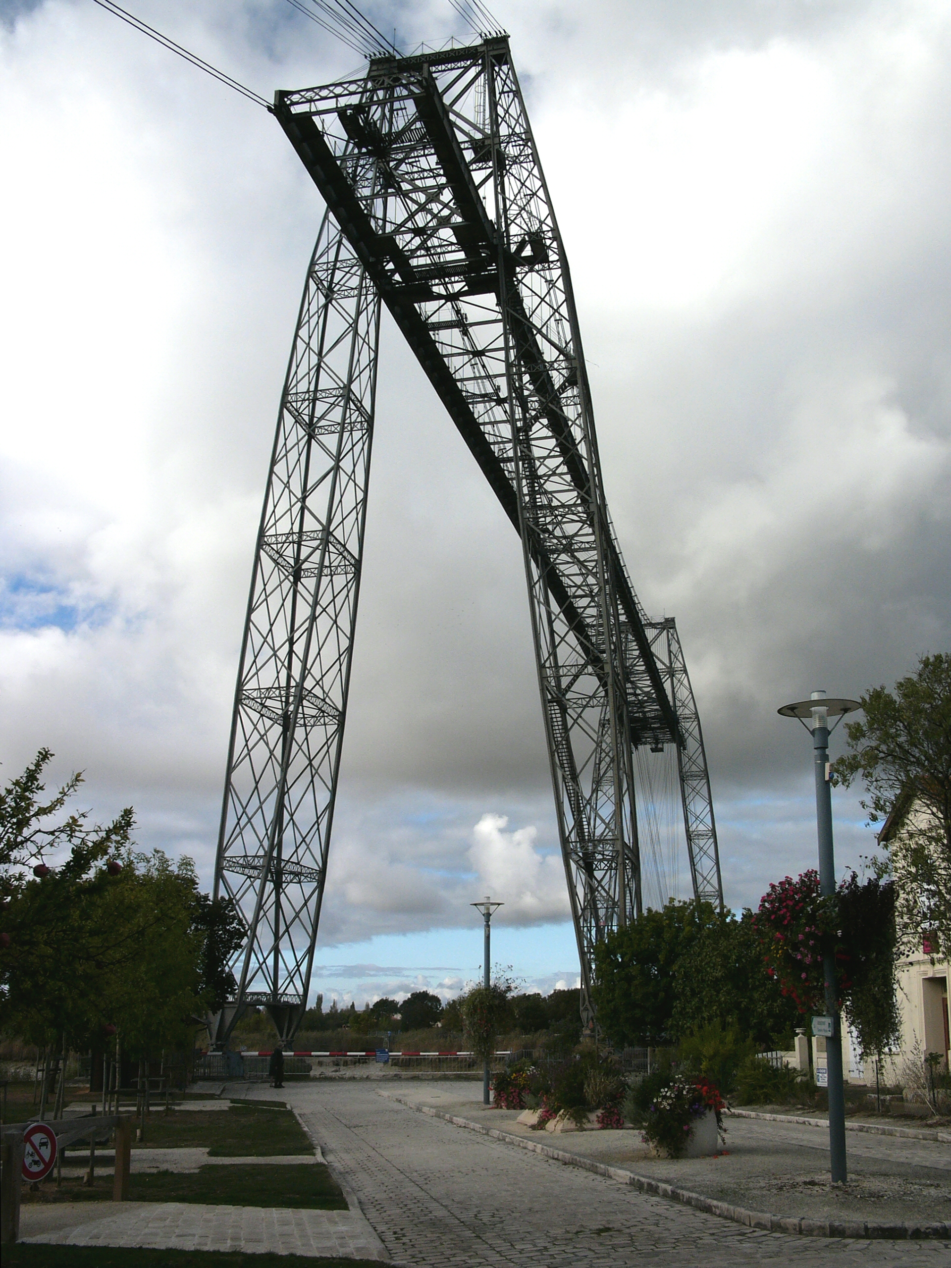 Pont Transbordeur de Martrou Rochefort Charente Maritime France